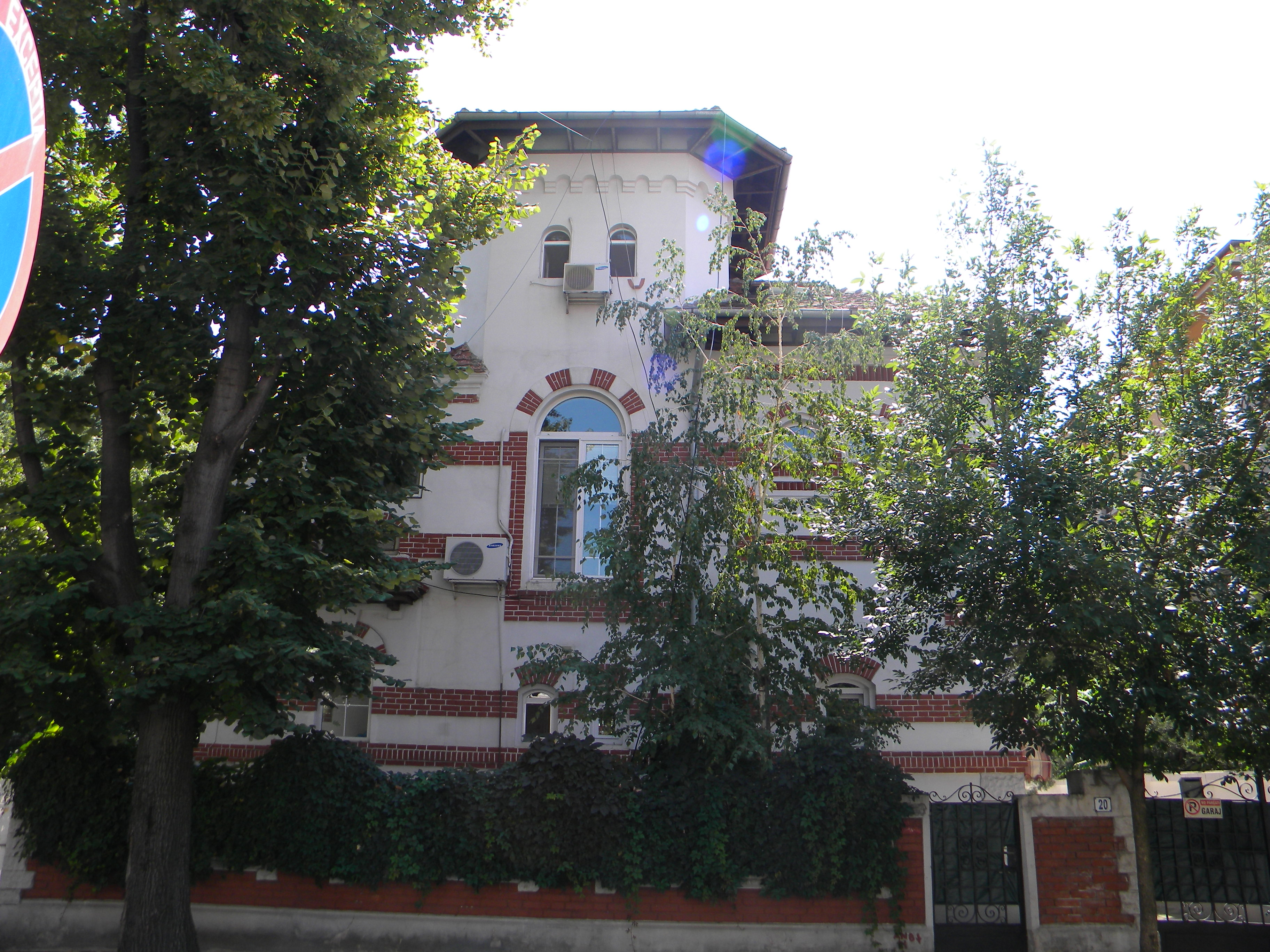 Vila pe Strada Sofia nr. 20, Bucuresti sect. 1